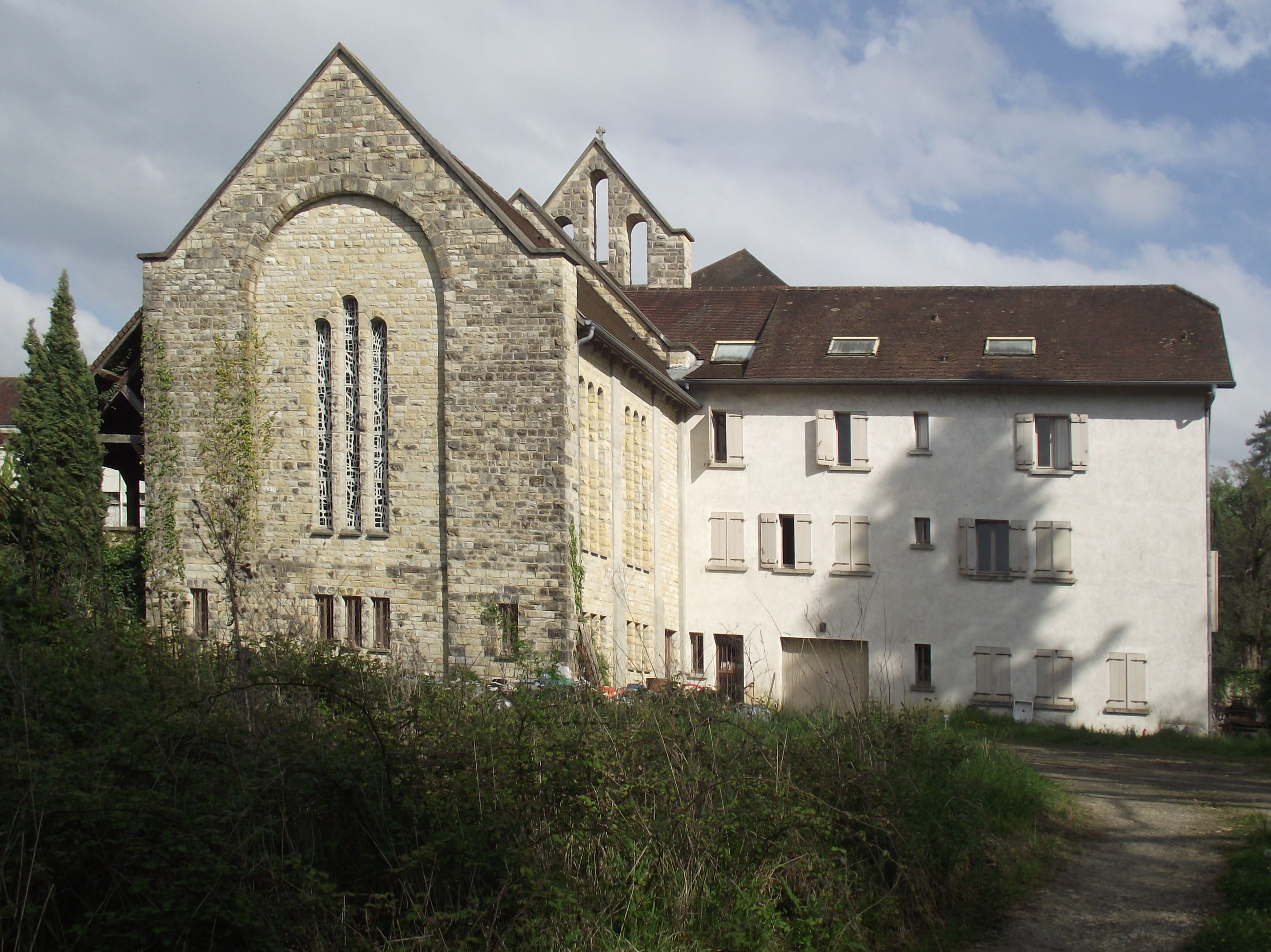 Ancienne abbaye de I'Immaculée Conception d'Ozon (Hautes-Pyrénées, France)